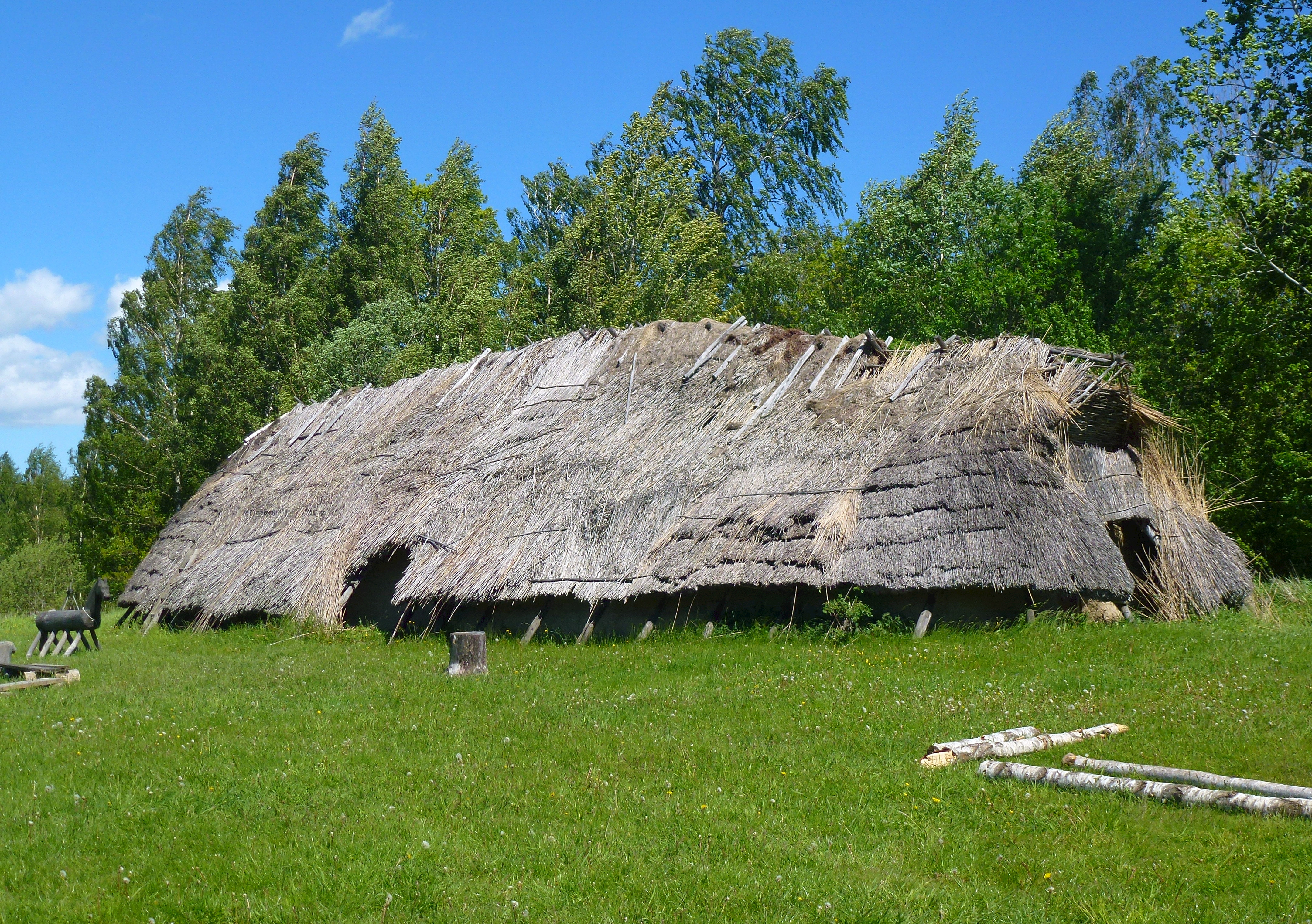 Järnåldershuset Körunda i Nynäshamnskommun